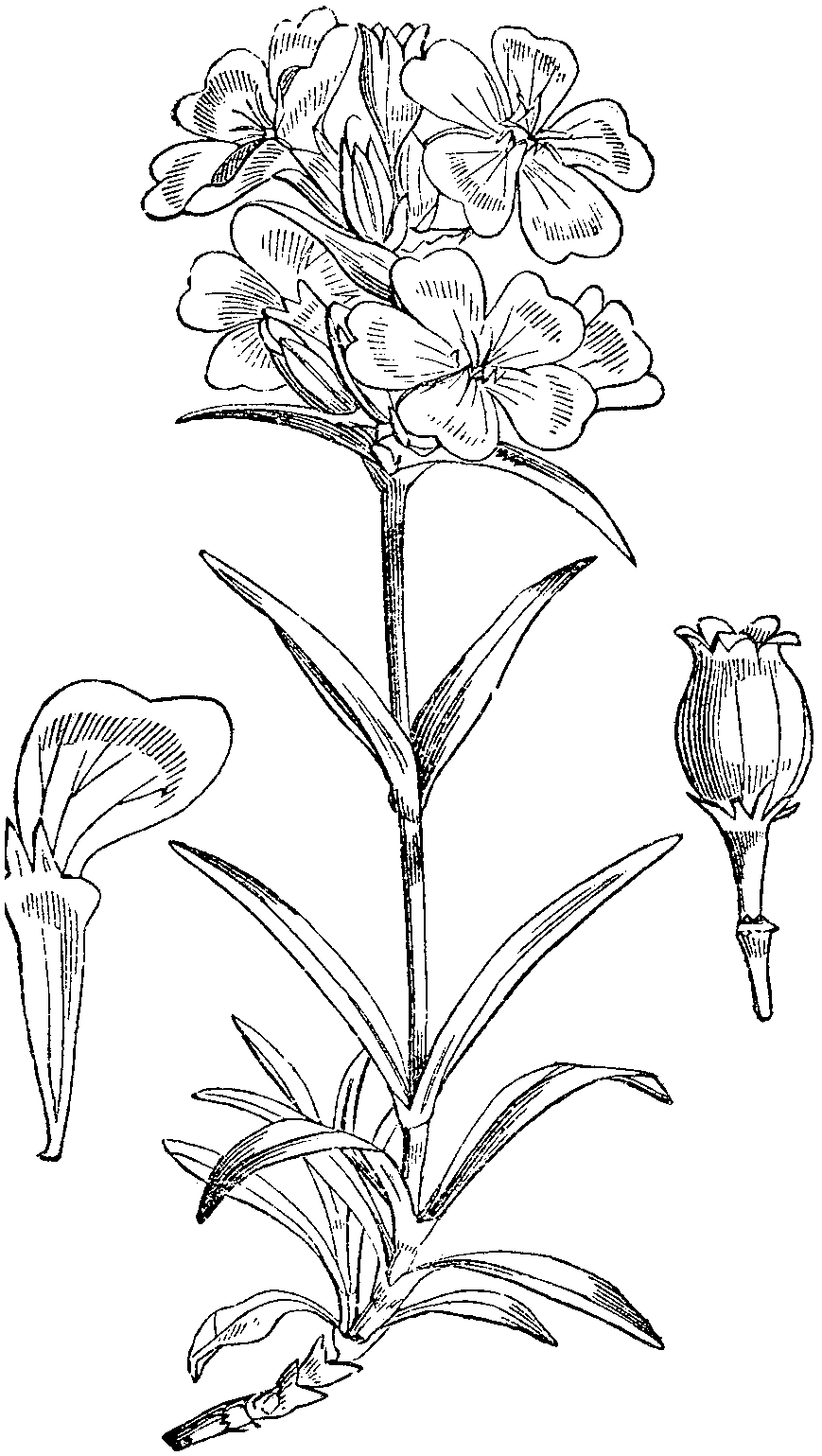 Slika 368. Smolnica. (Lýchnis viscária [sic].)